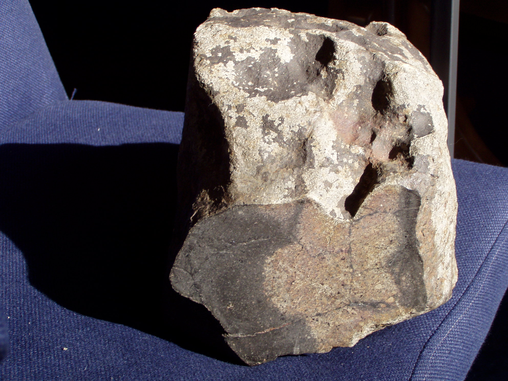 Hauptmasse Meteorit Benthullen Oldenburg/Oldbg.